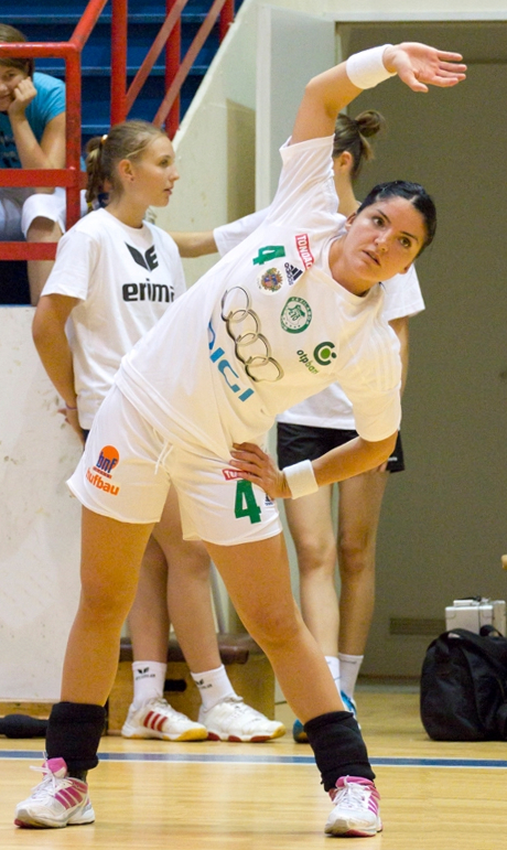 Jovanka Radičević